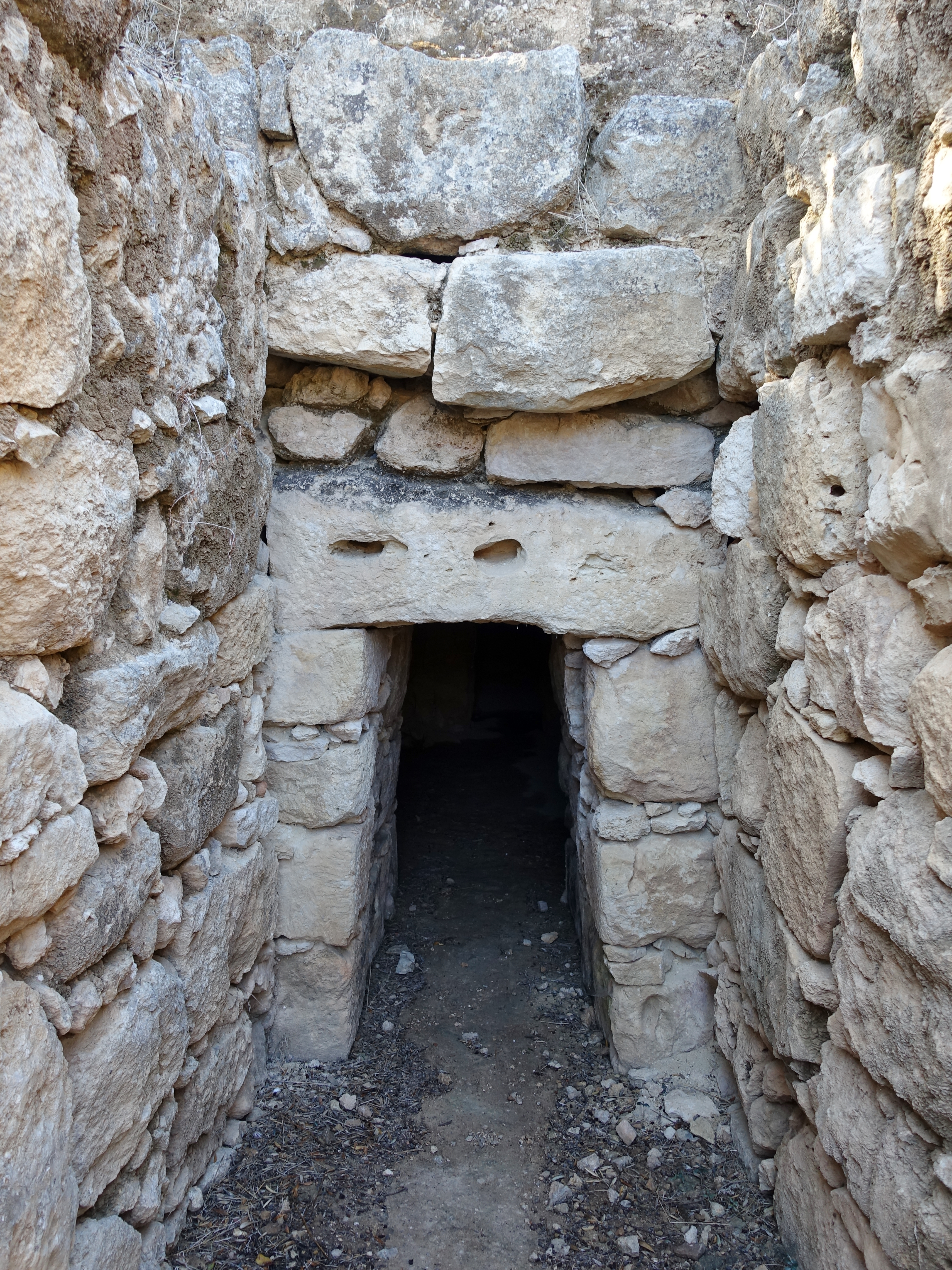 Tholos-Grab von Platyskinos bei Achladia (Πλατύσκινος, Αχλάδια Σητείας), Gemeinde Sitia, Kreta, Griechenland